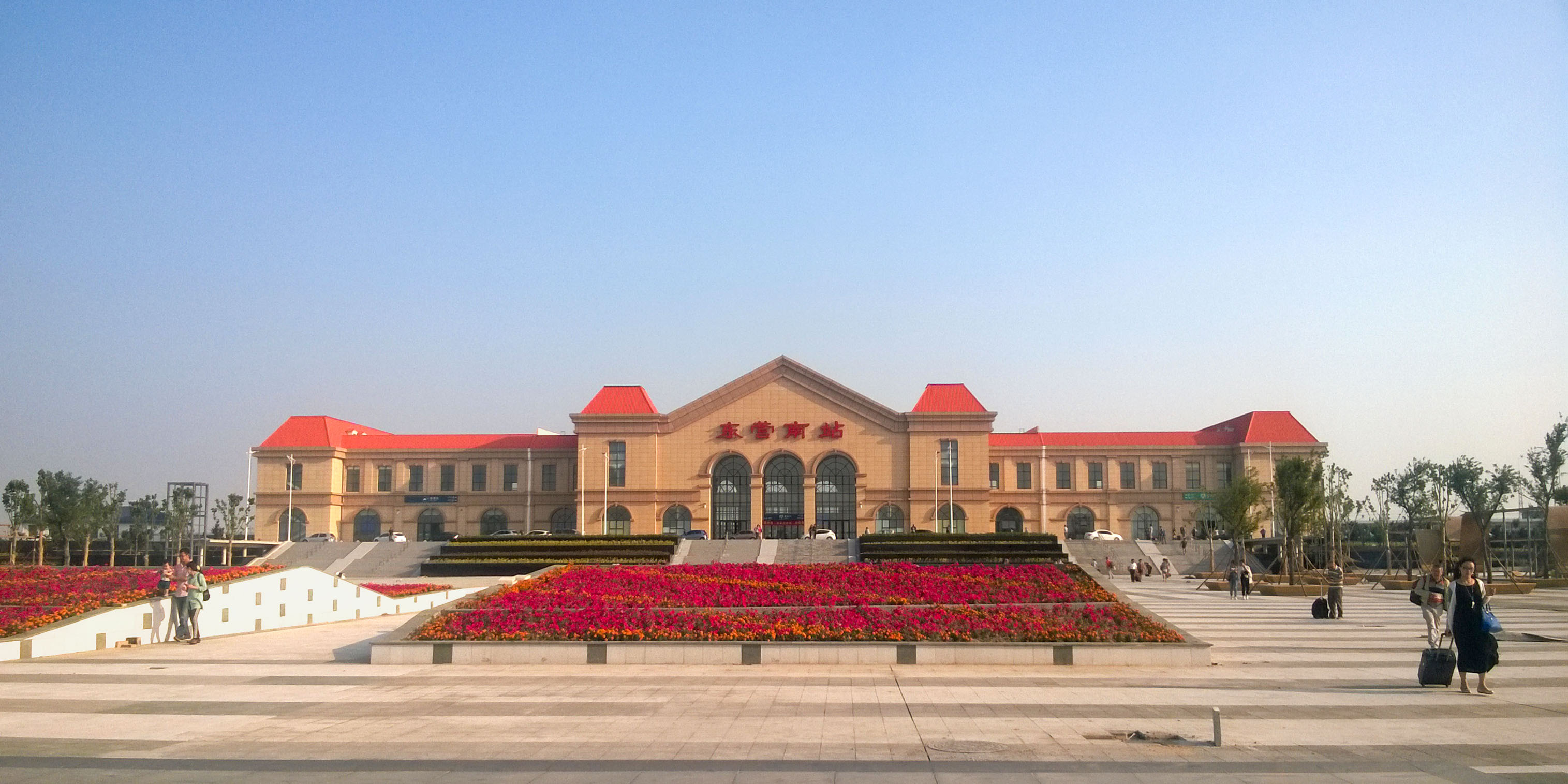 东营南站站房